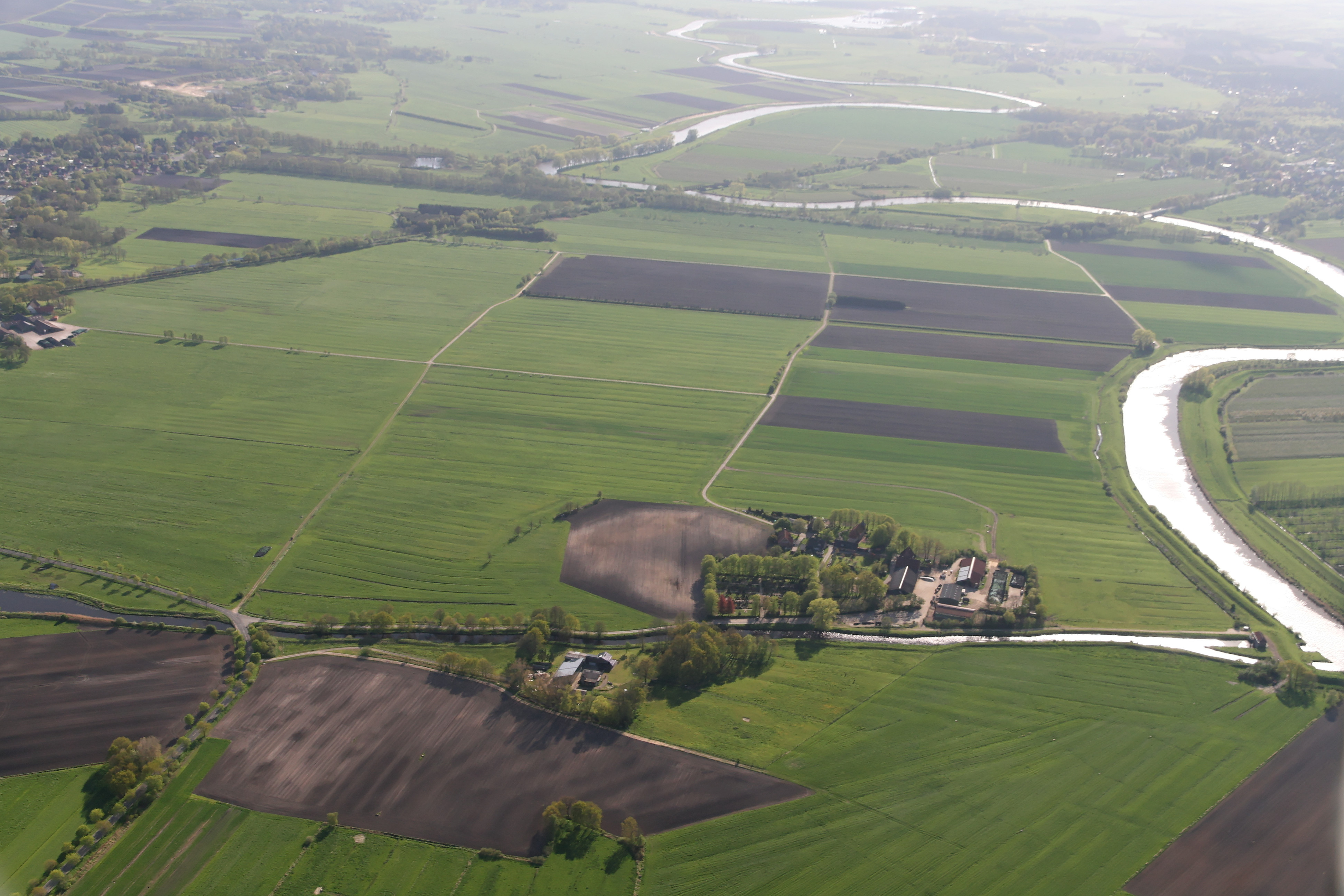 Host bi Burweg von Noordoosten keken, vörn de Hosterbeek, rechts de Oost. Baven links Burweg, baven rechts Heckthusen.